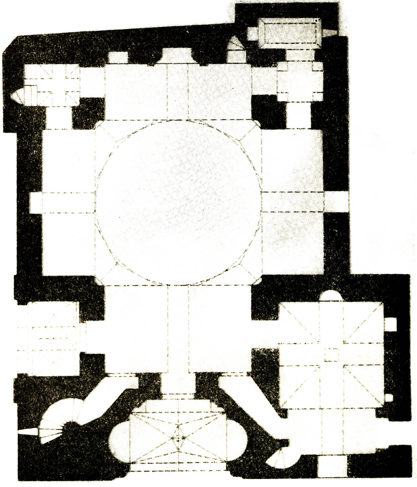 Şirvanşahlar sarayındakı Şah məscidinin planı